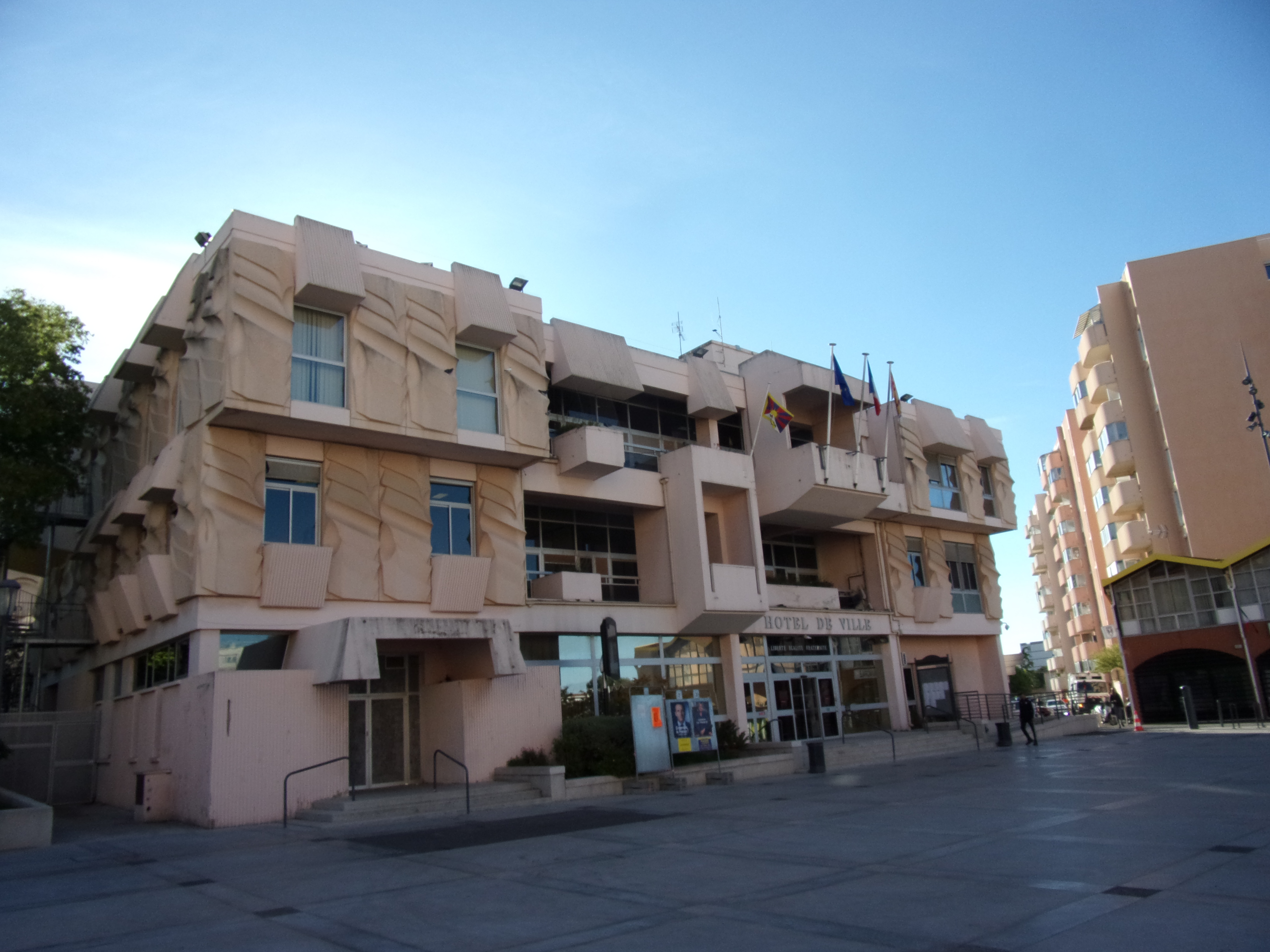 Hôtel de ville à Vitrolles